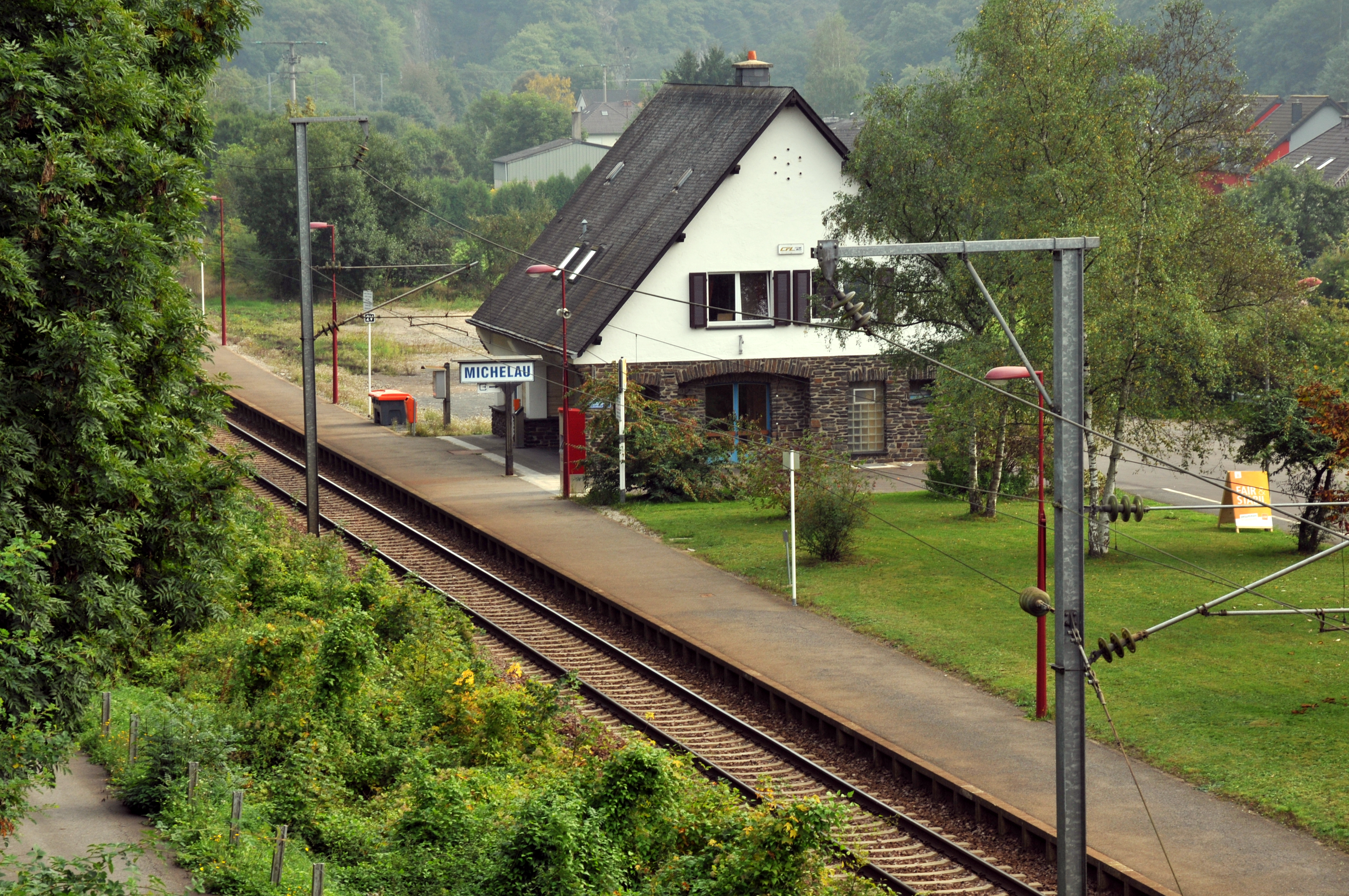 D'Gare vu Méchela.